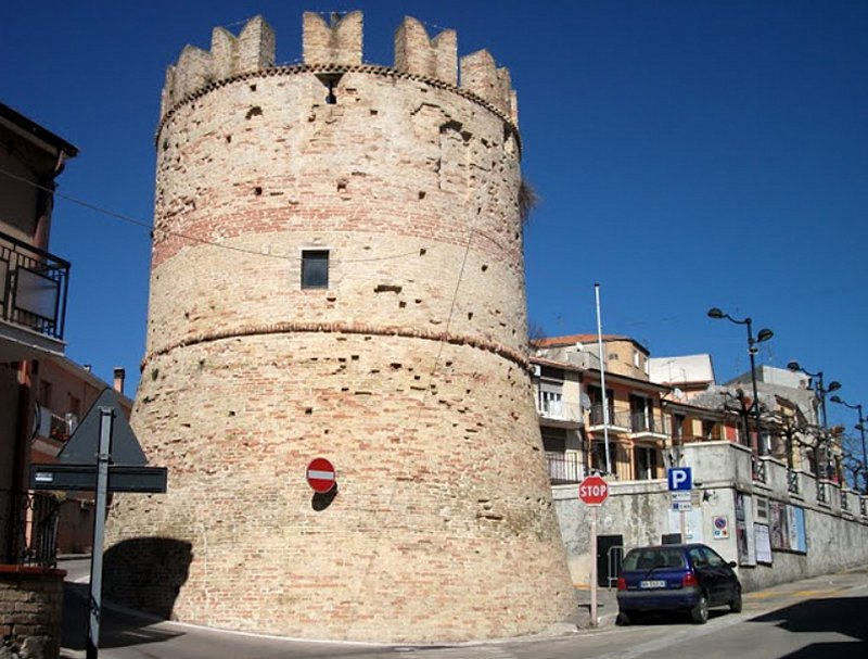 Torre difensiva aragonese, di forma cilindrica con merlatura ghibellina di coronamento. Fatta costruire da Ferdinando d'Aragona dopo il 1484, a baluardo e difesa della città.